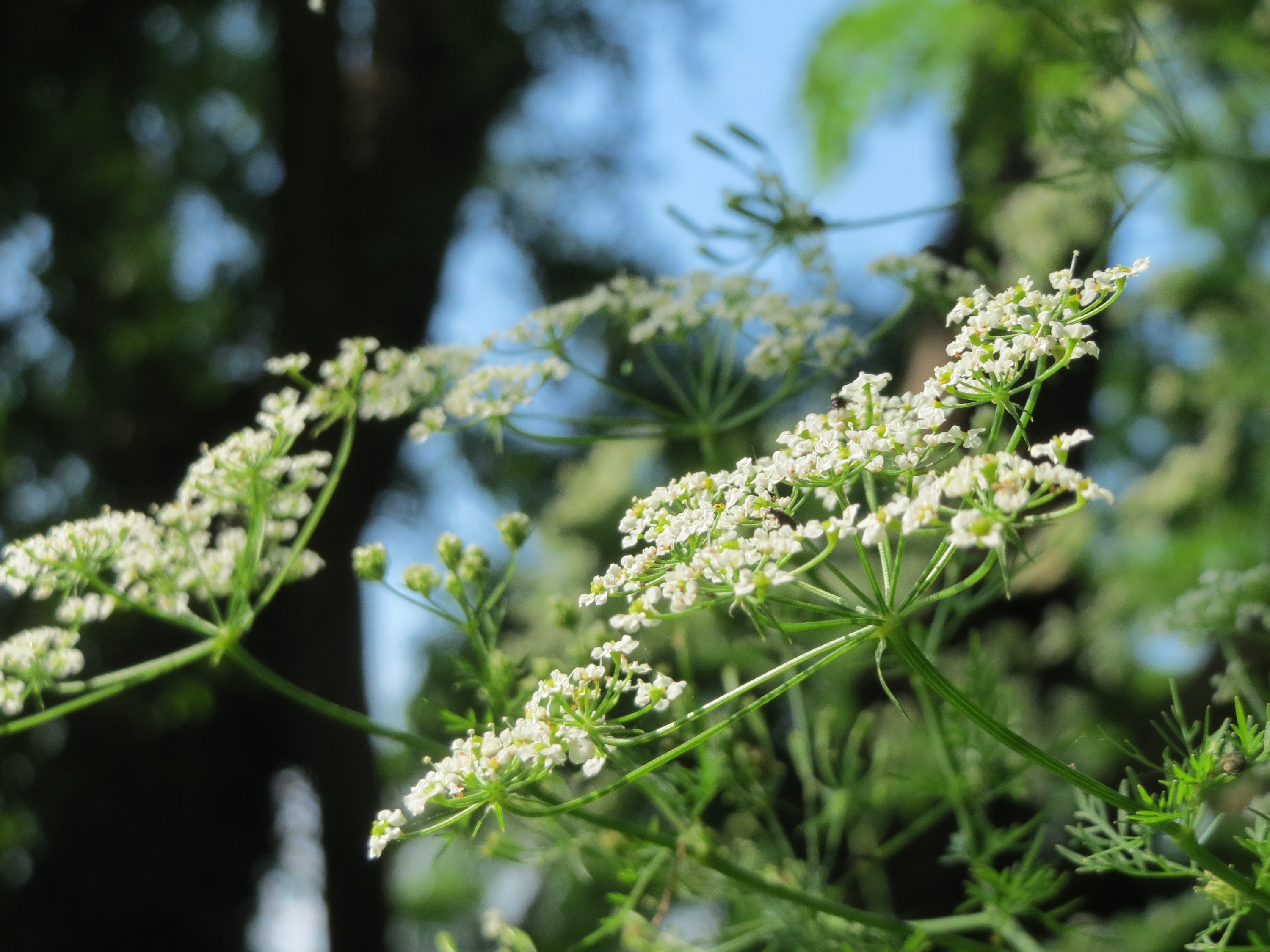 Knolliger Kälberkropf (Chaerophyllum bulbosum) im Hockenheimer Rheinbogen